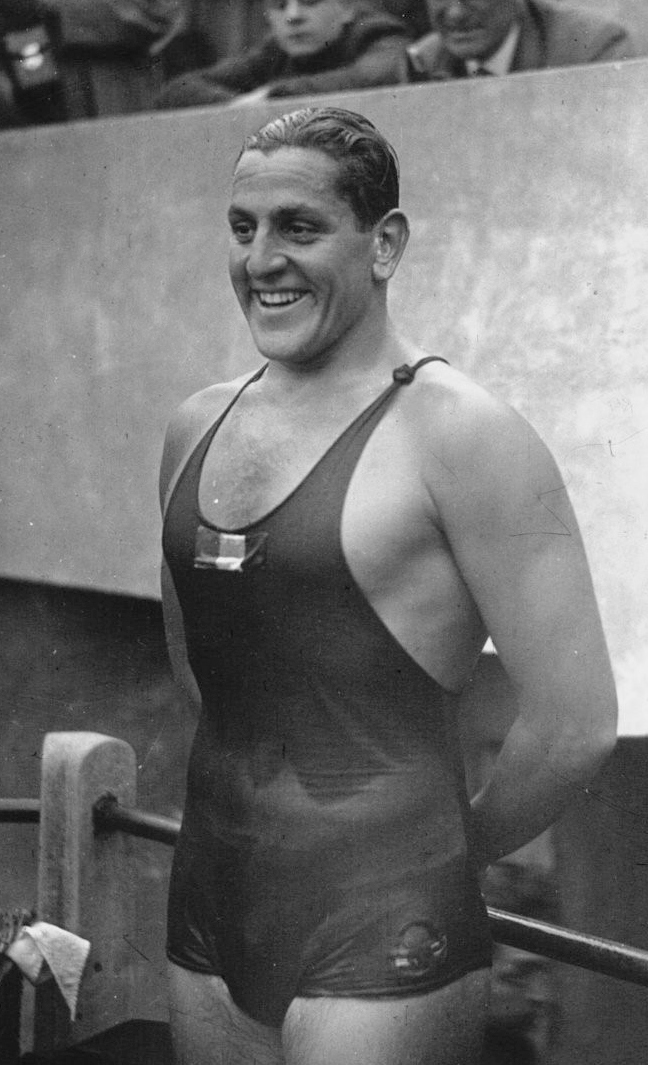 Les Tourelles : Championnats d'Europe : Costoli, Italien (portrait à 3 m) : [photographie de presse] / Agence Meurisse